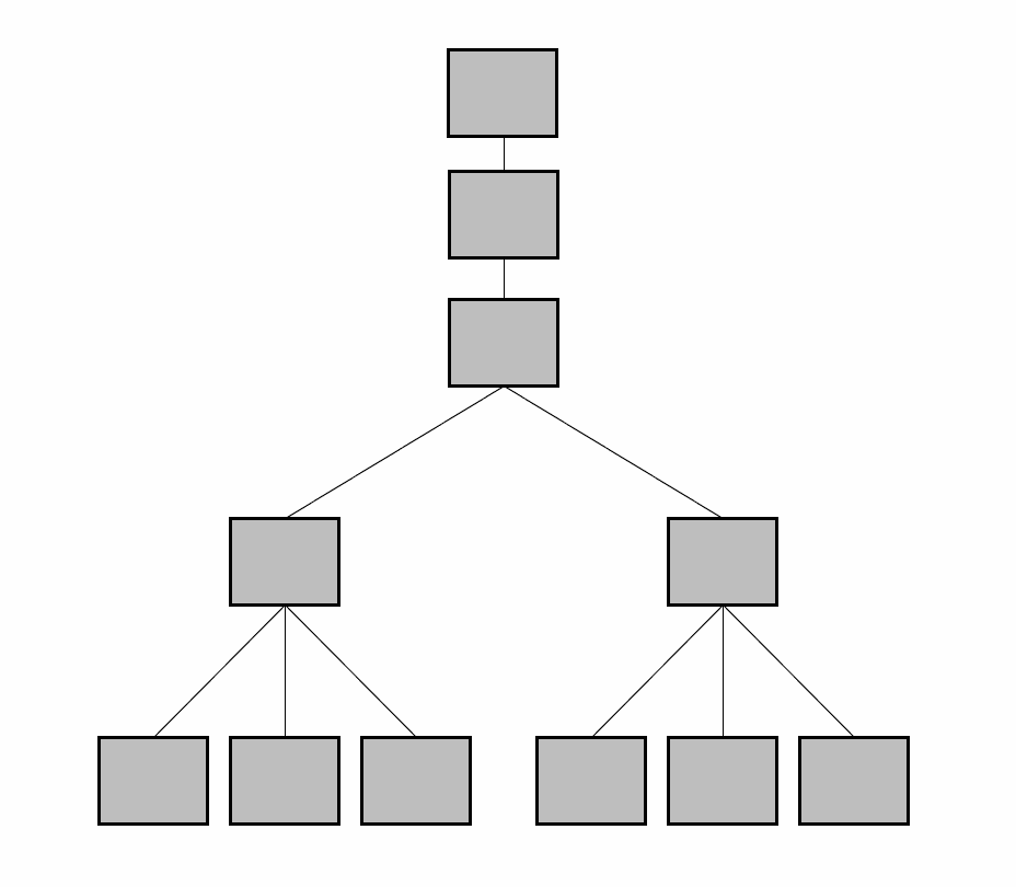 Hierarchisches Datenbankmodell, Siehe auch: Bild:Netzwerkdatenbankmodell.png